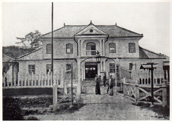 開院当時写真